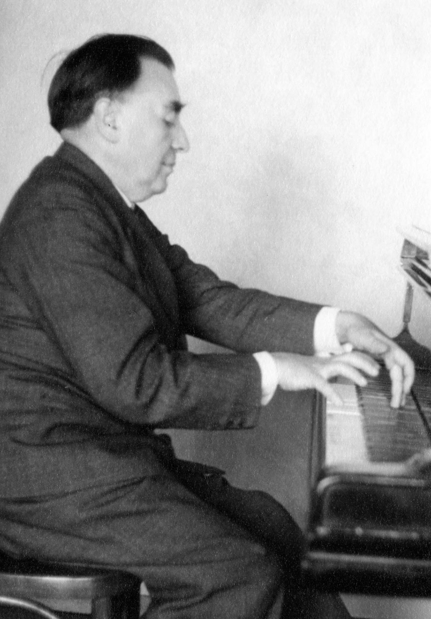 Cette pièce représente Paul Loyonnet jouant du piano pendant la Deuxième Guerre mondiale.